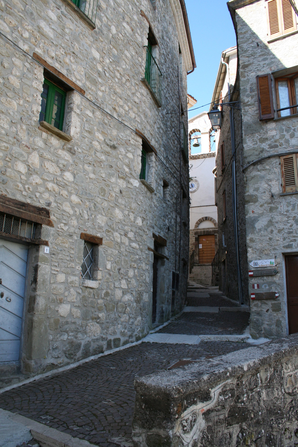 Via Vittorio Veneto di Pietracamela in provincia di Teramo, sul fondo la facciata bianca della chiesa di San Giovanni Battista.